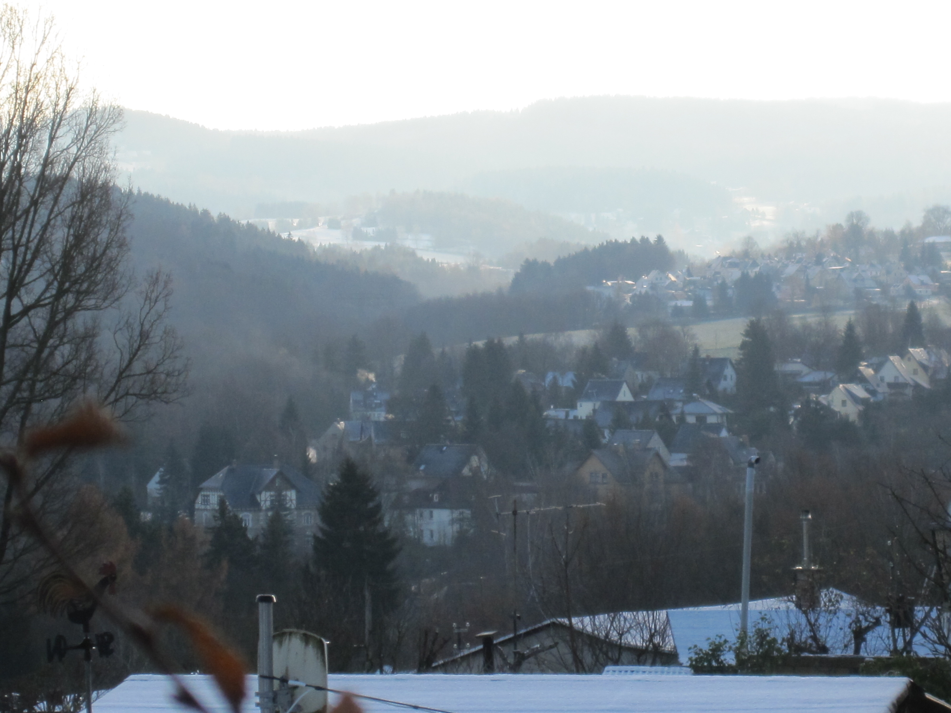 Rodewisch: Bahnhof und Ausblicke vom Bahnhof in die Umgebung bis ins Erzgebirge.